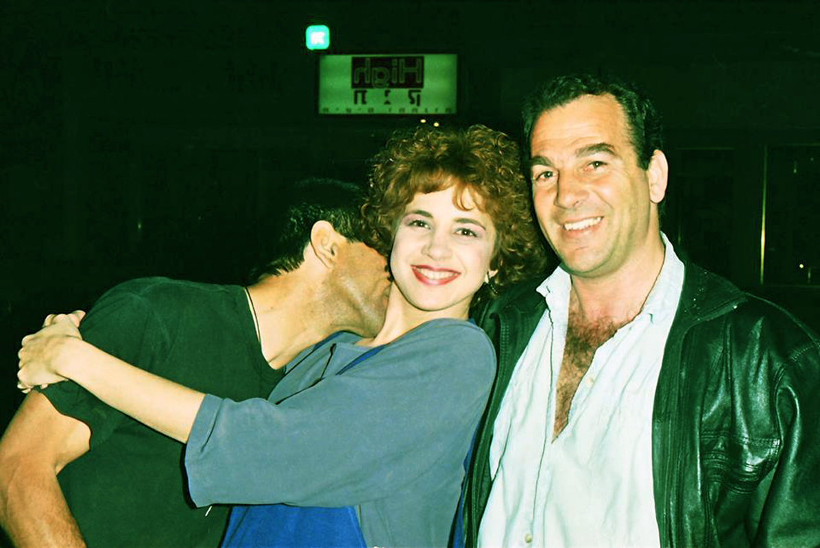 דני פראן עם ענת וקסמן בהפקה באולפני הרצליה בתחילת שידורי ערוץ 2